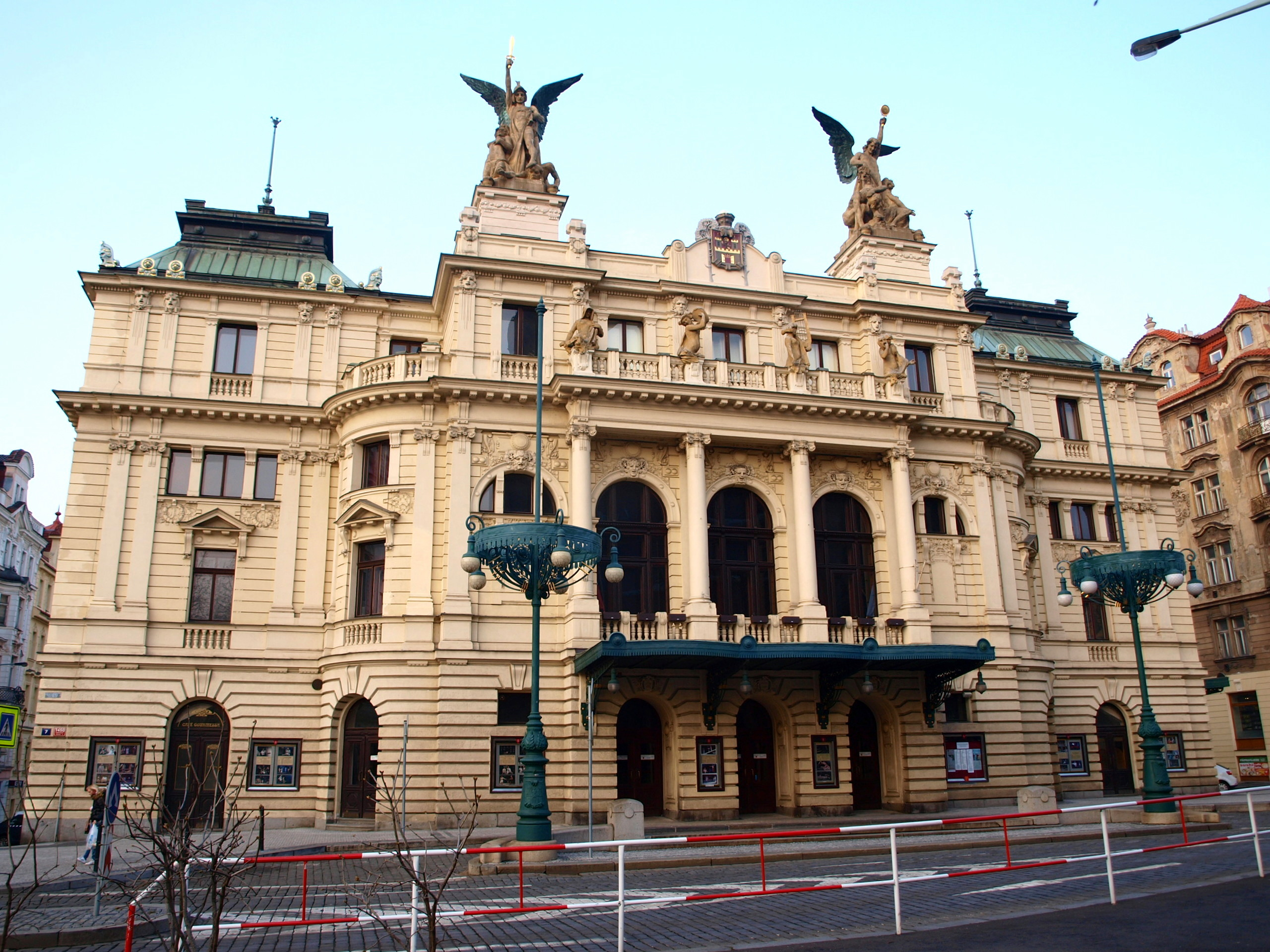 Vinohradské divadlo